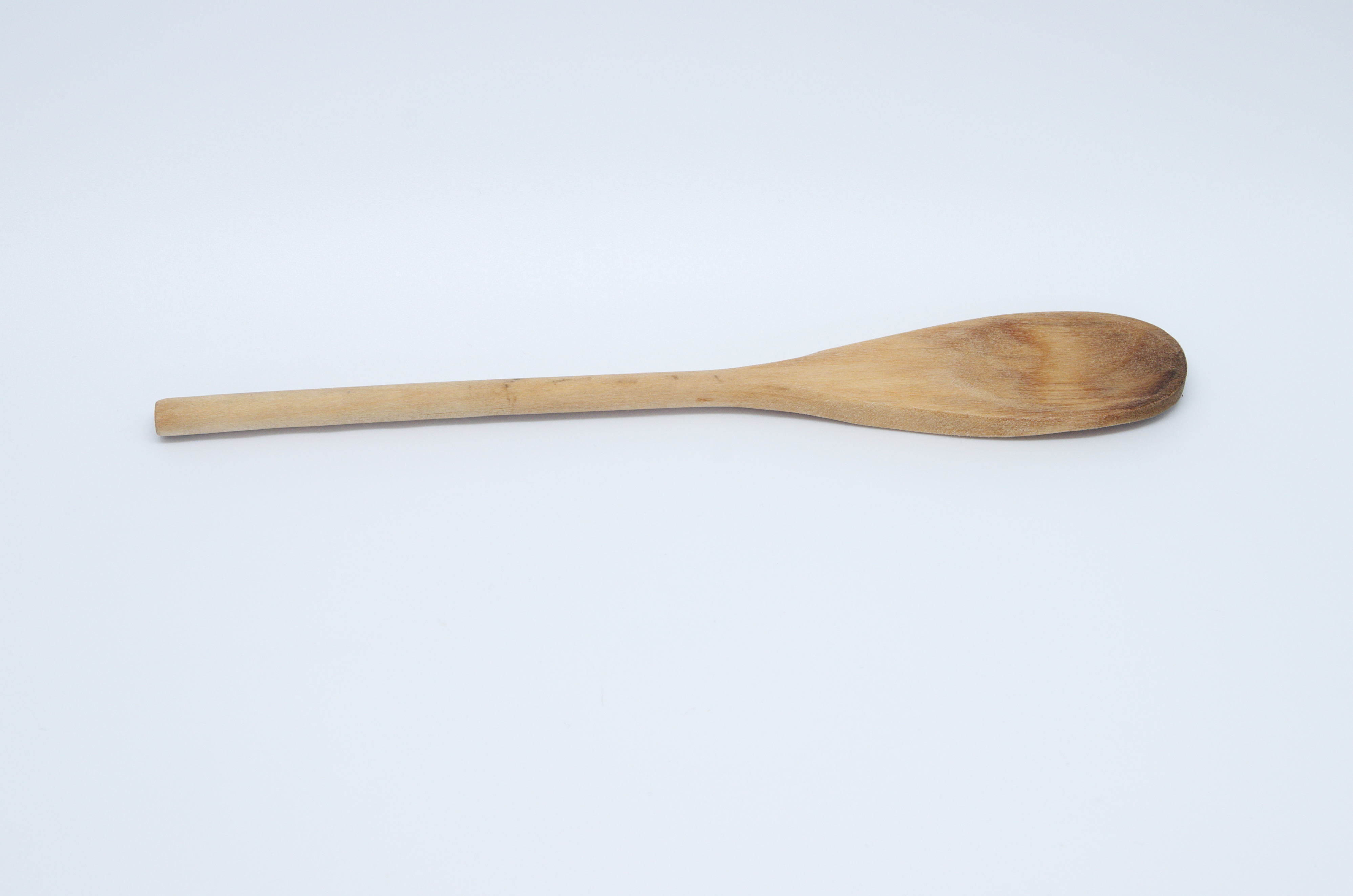 Cuiller en bois 2 - dessus